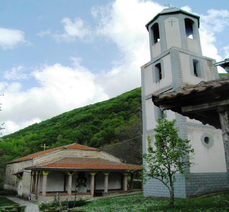 Св. Илија во Виничко Блатец